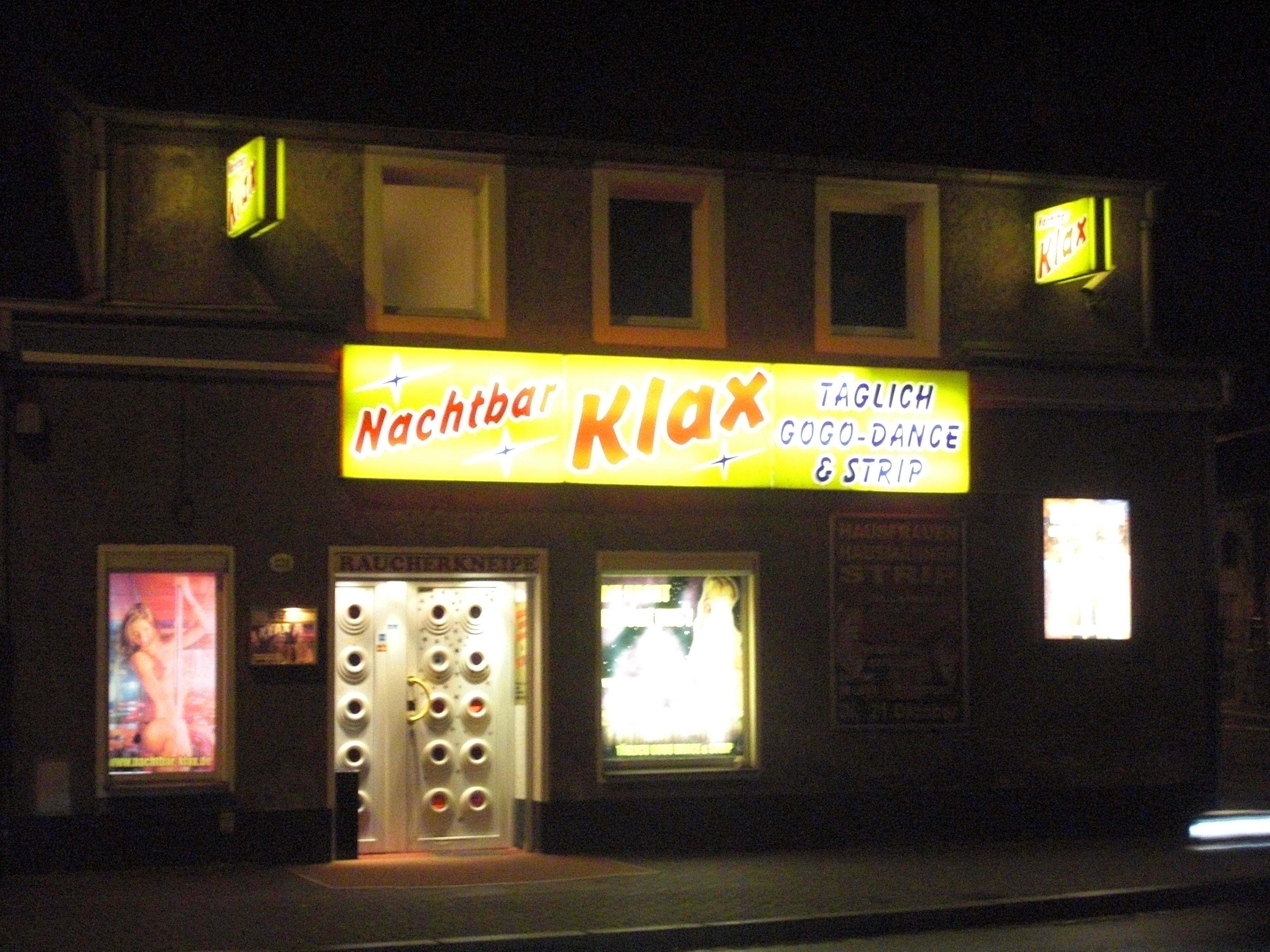 Dresden